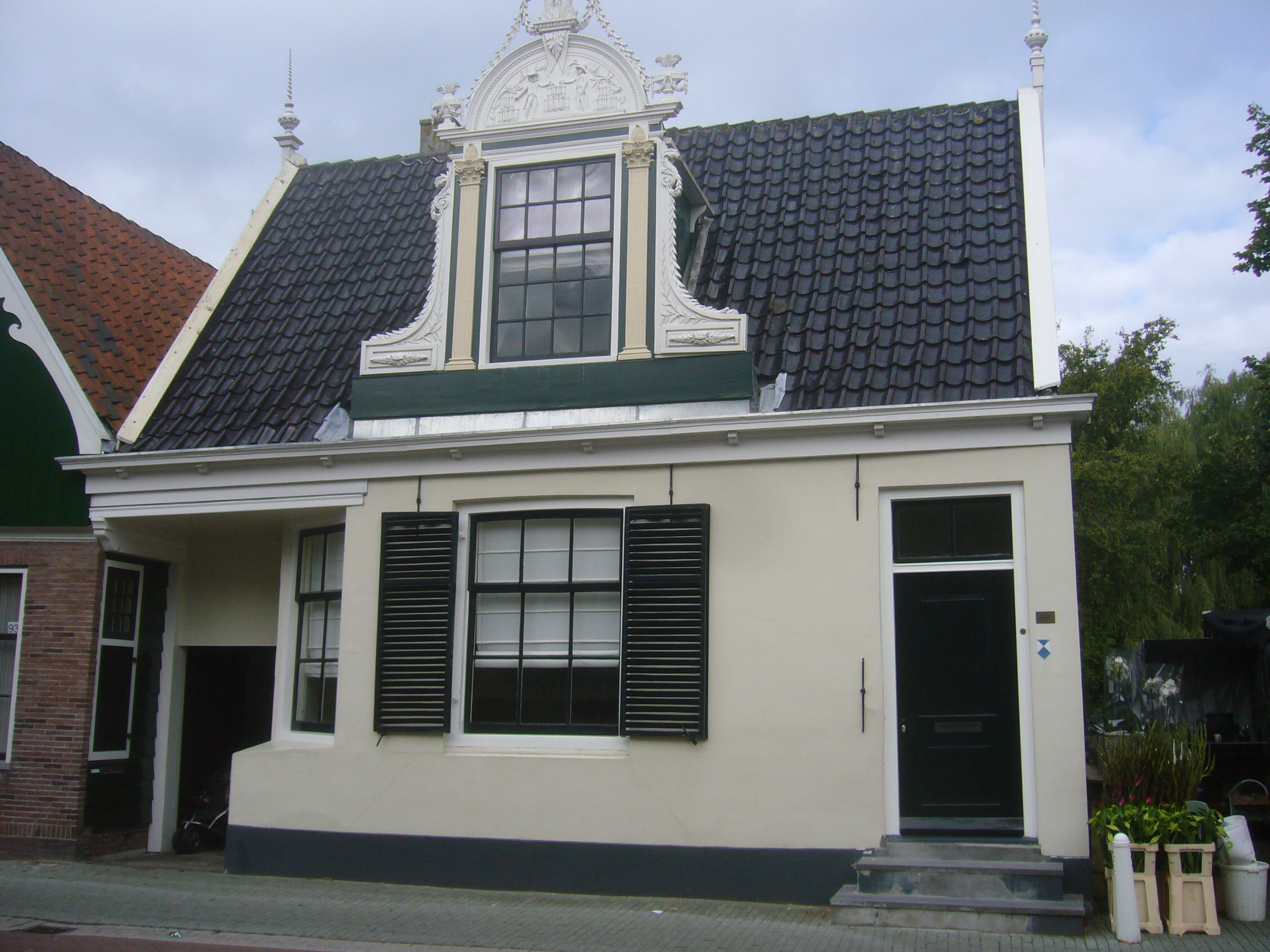 voorgevel woonhuis in Zaanse stijl